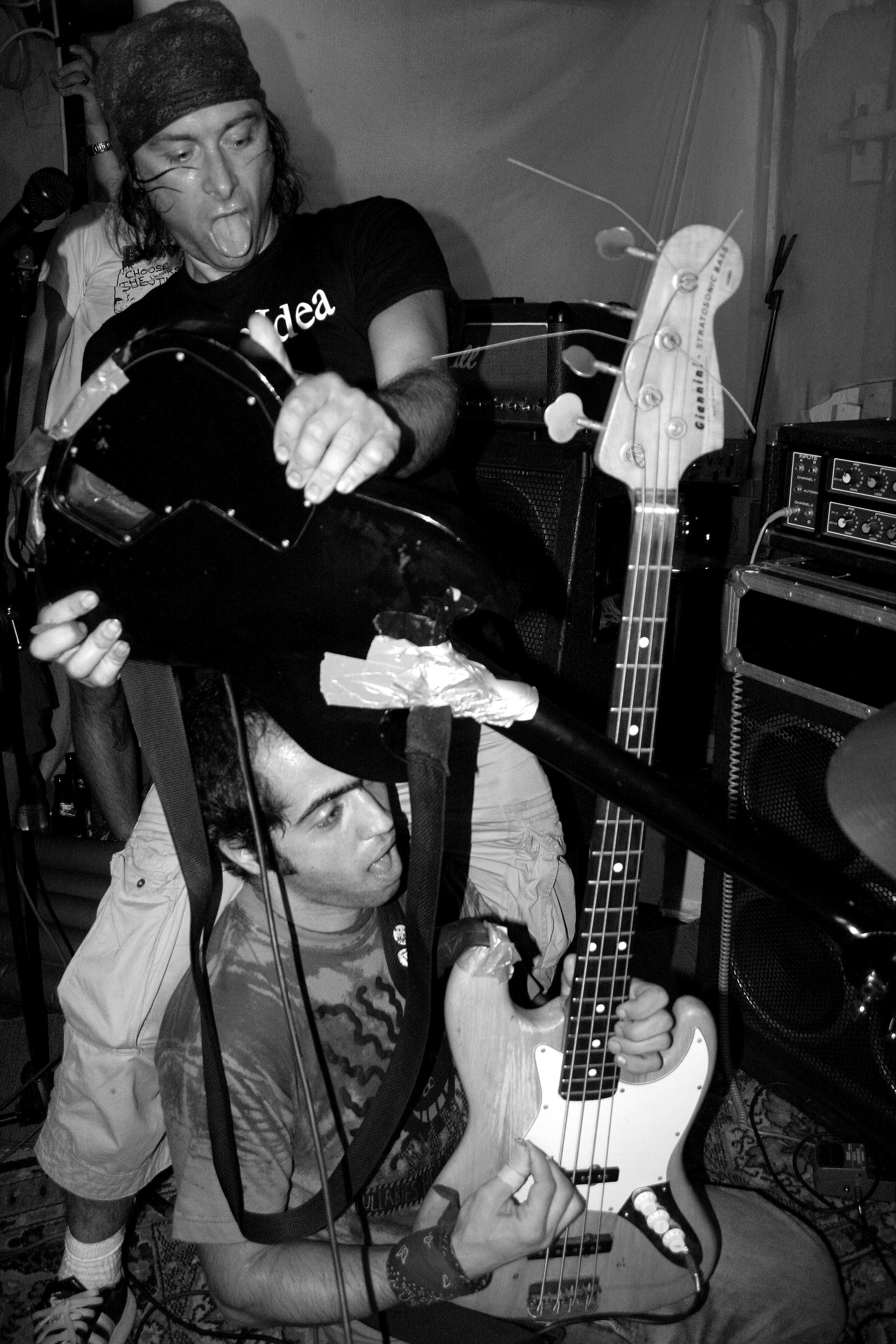 Vitamin X en concert à Mayence (Allemagne).